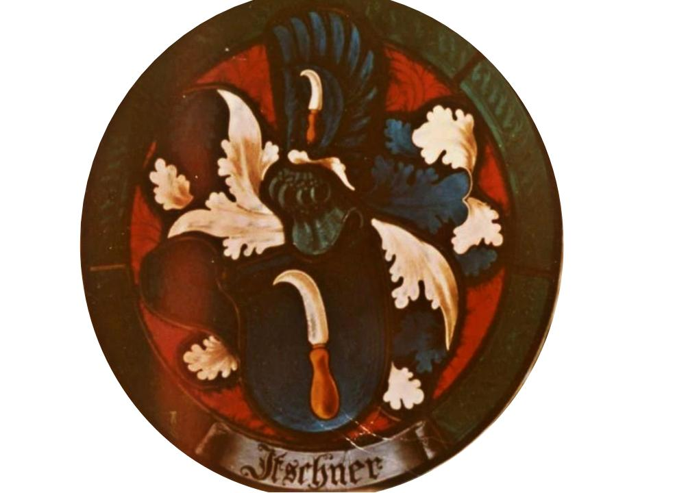 Familienwappen des Geschlechts Itschner. Blaues Schild auf dem ein silbernes Rebmesser mit goldenem Griff ist.